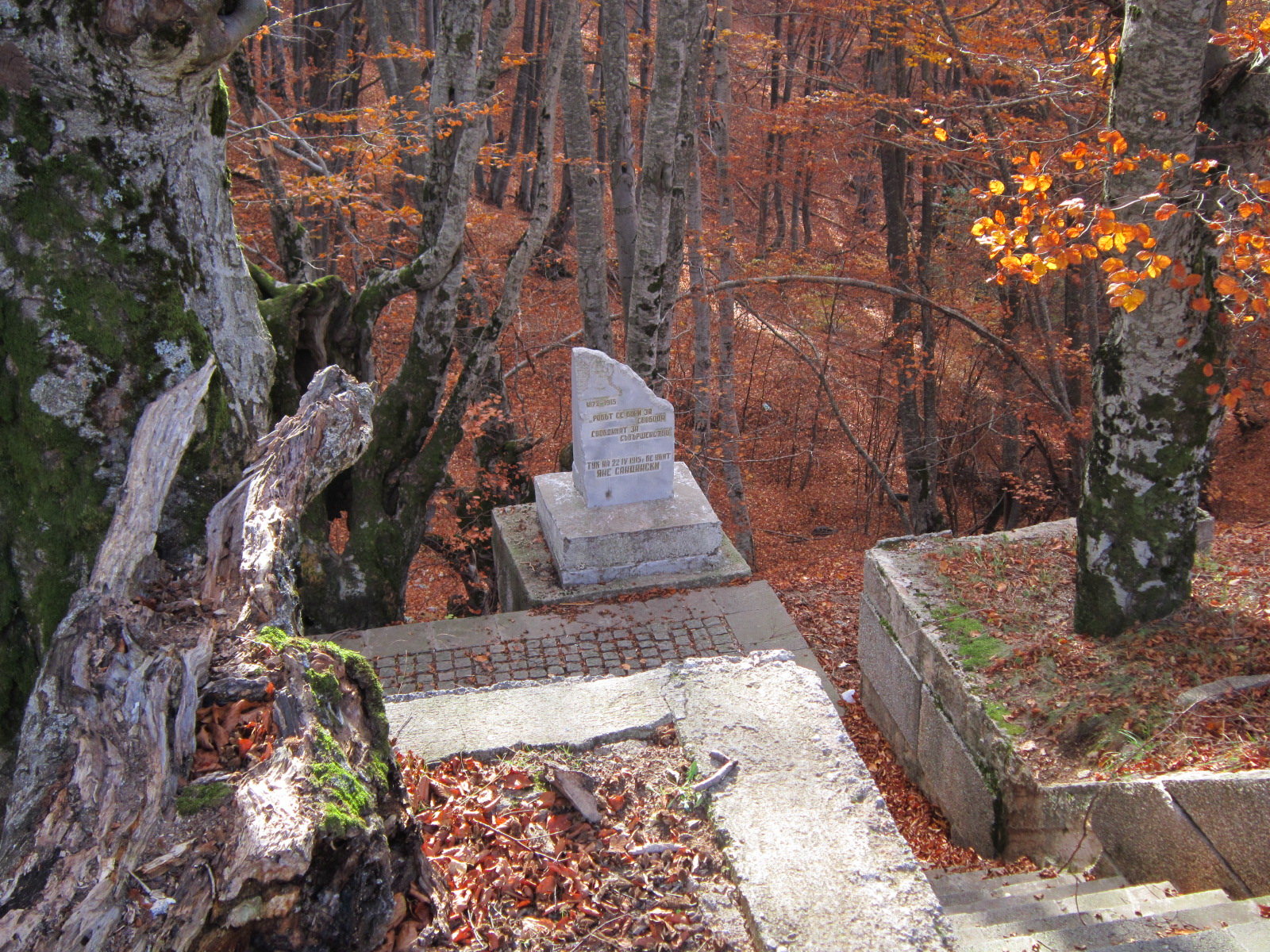 Лобното място на Яне Сандански по пътя между Петрич и Гоце Делчев GPS: N 41.53080 x E 23.60014 "Папаз чаир"